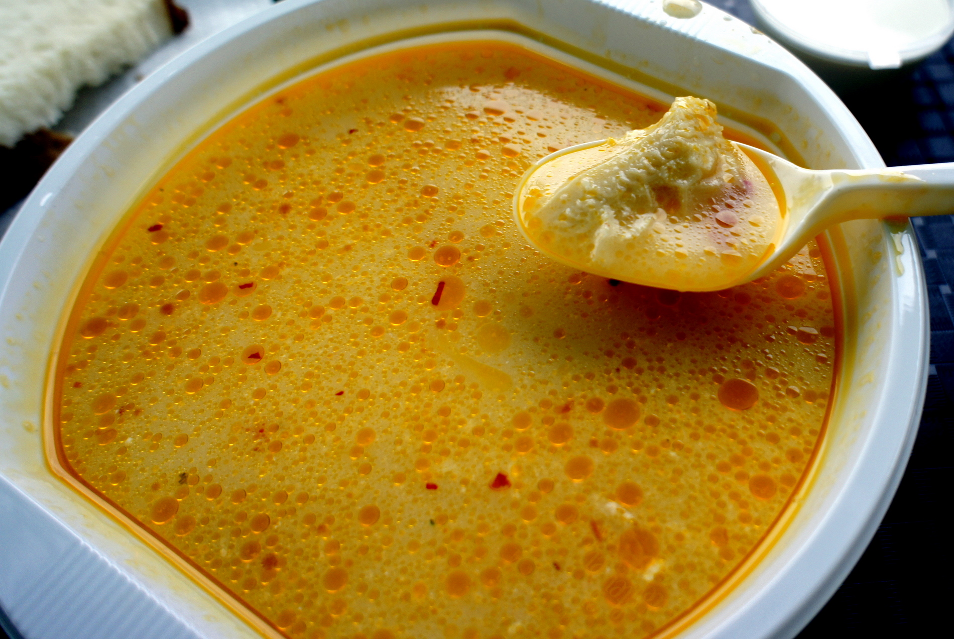 Ciorbă de burtă - flaczki podawane w przydrożnym barze w okręgu Neamţ ( Rumunia )